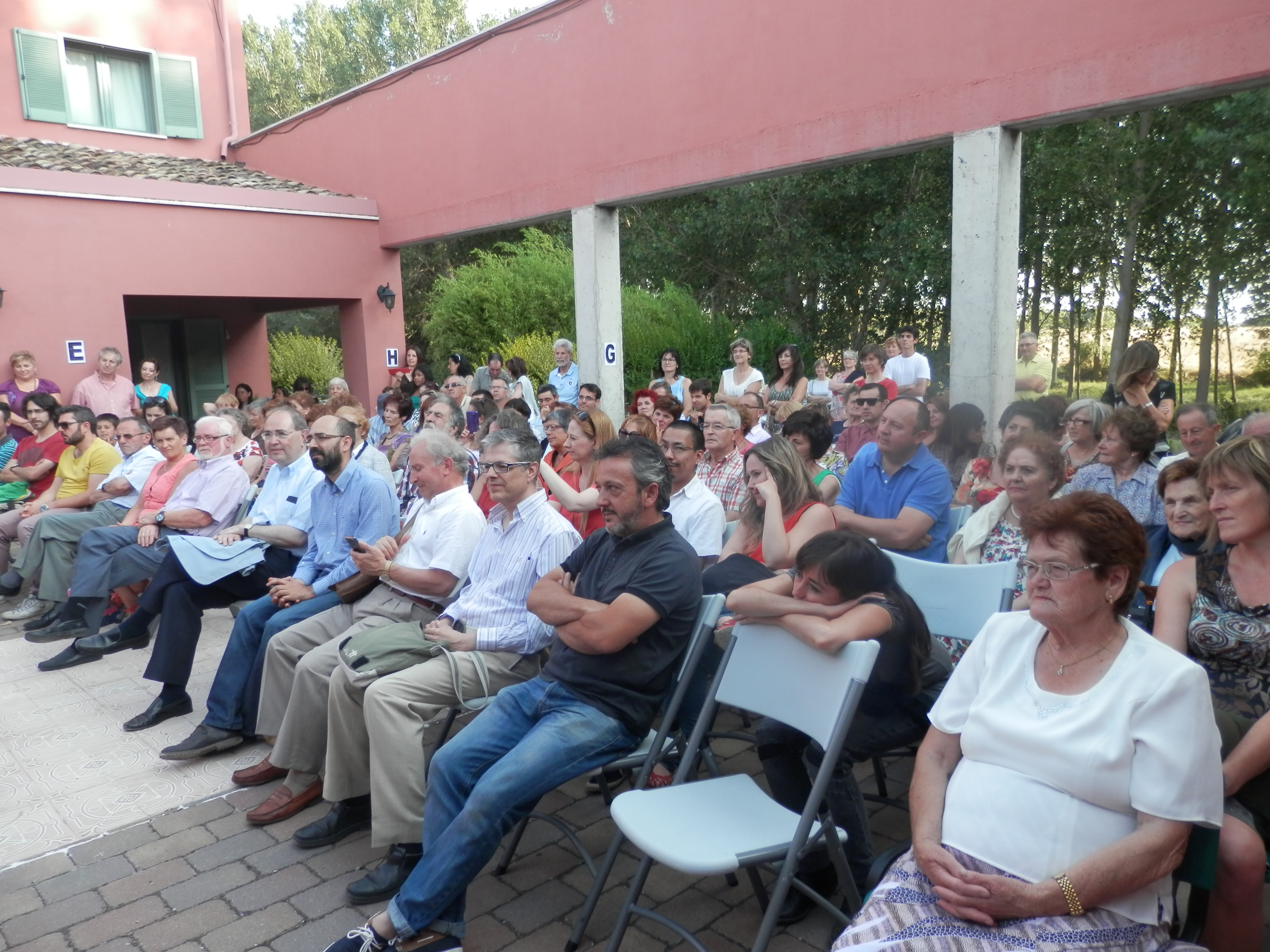 Público asistente a la velada poética en Olmillos de Sasamón (Burgos), 9 de agosto de 2014.